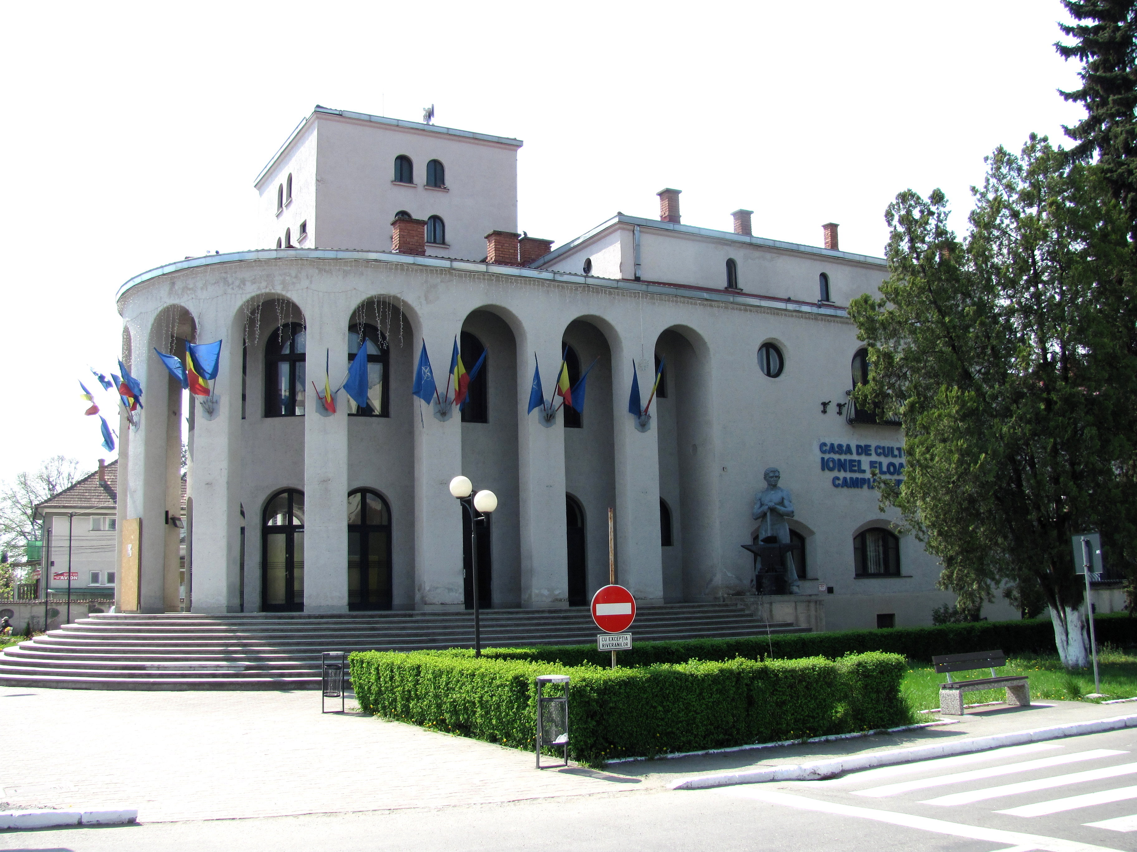 Câmpia Turzii, Piața Mihai Viteazu nr.8, Palatul Cultural „Ionel Floașiu” 01